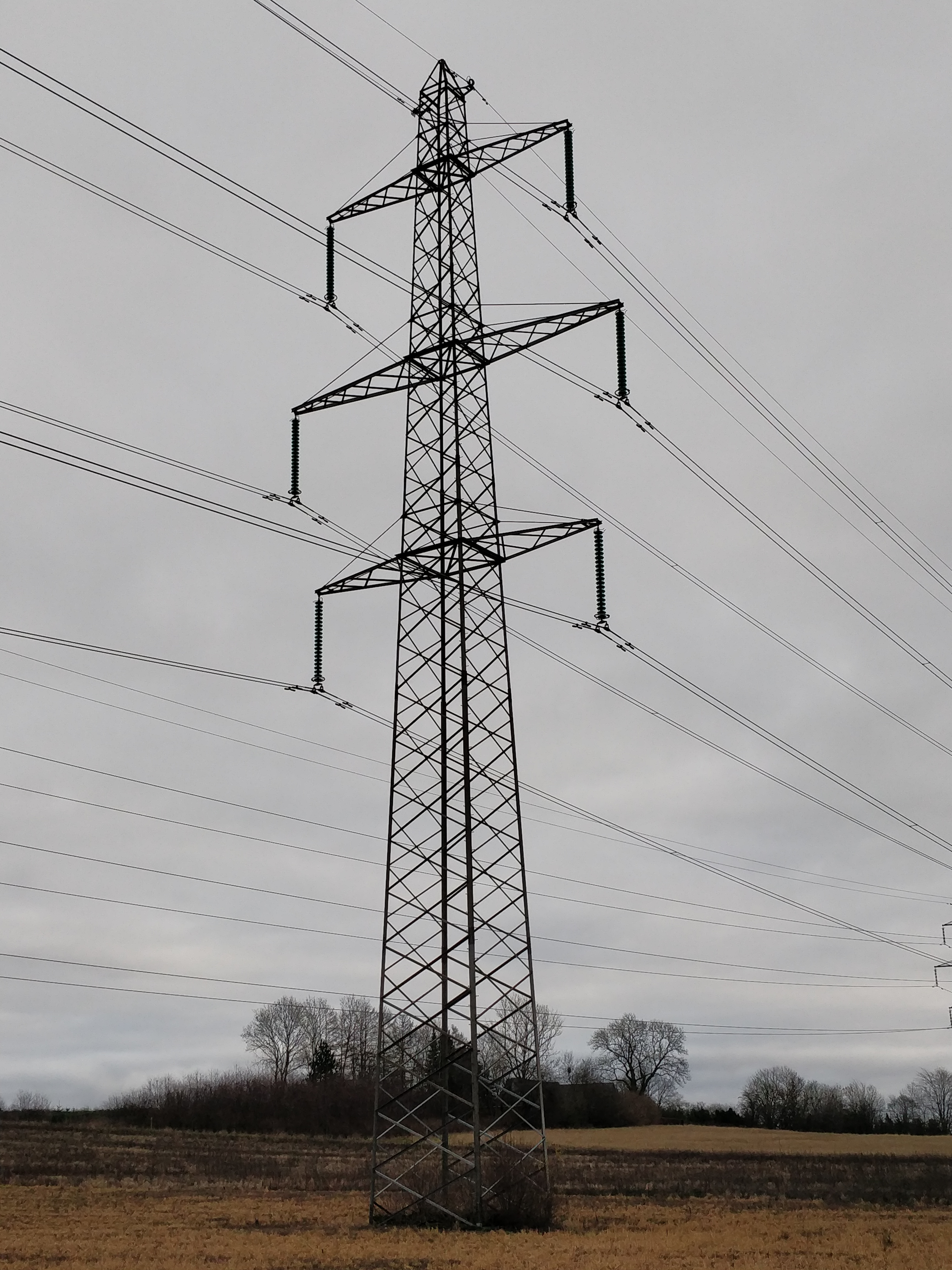 400 kV eifelmast, syd for Stenløse, Hovegård-Kyndbyværket forbindelsen